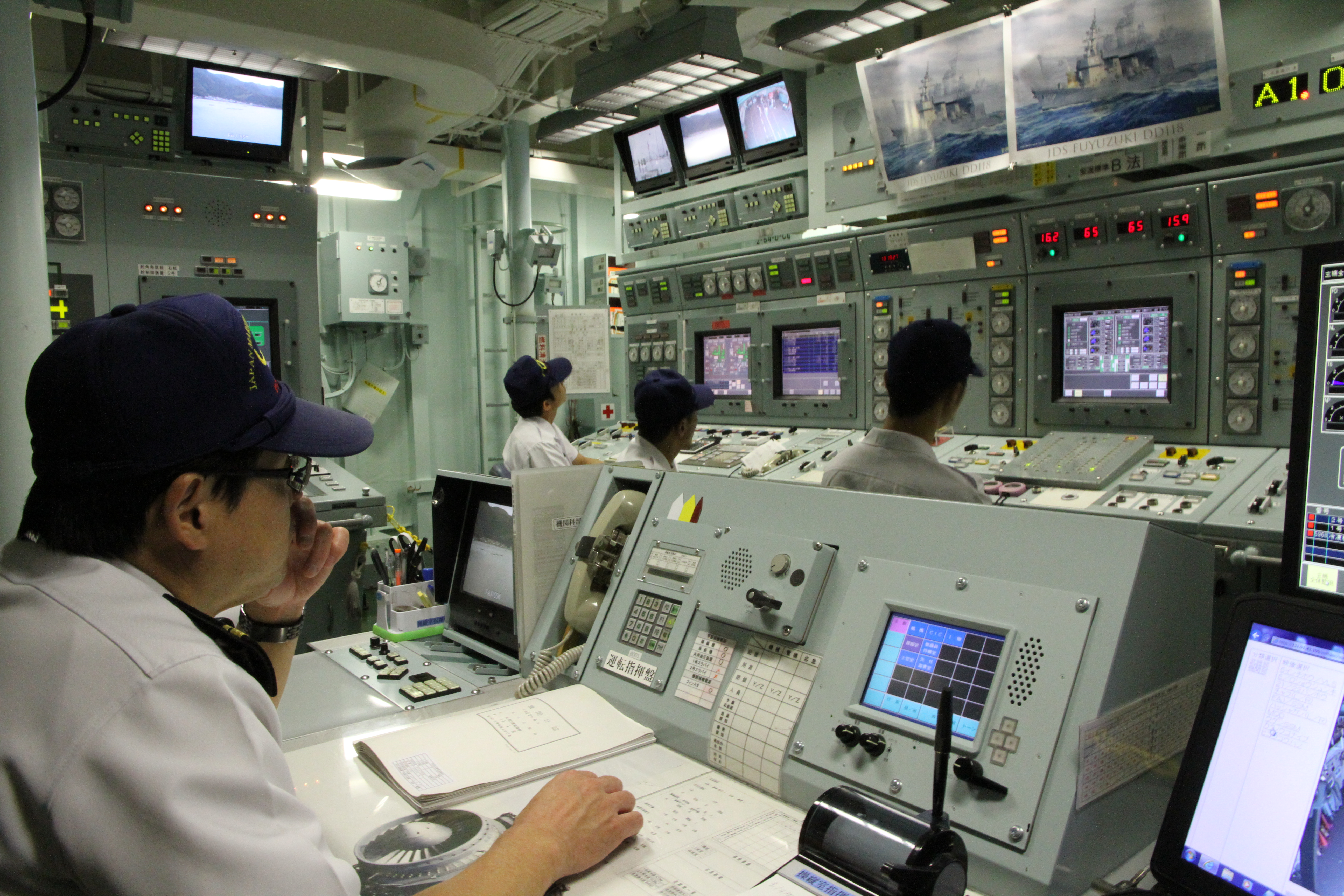 護衛艦ふゆづき体験航海